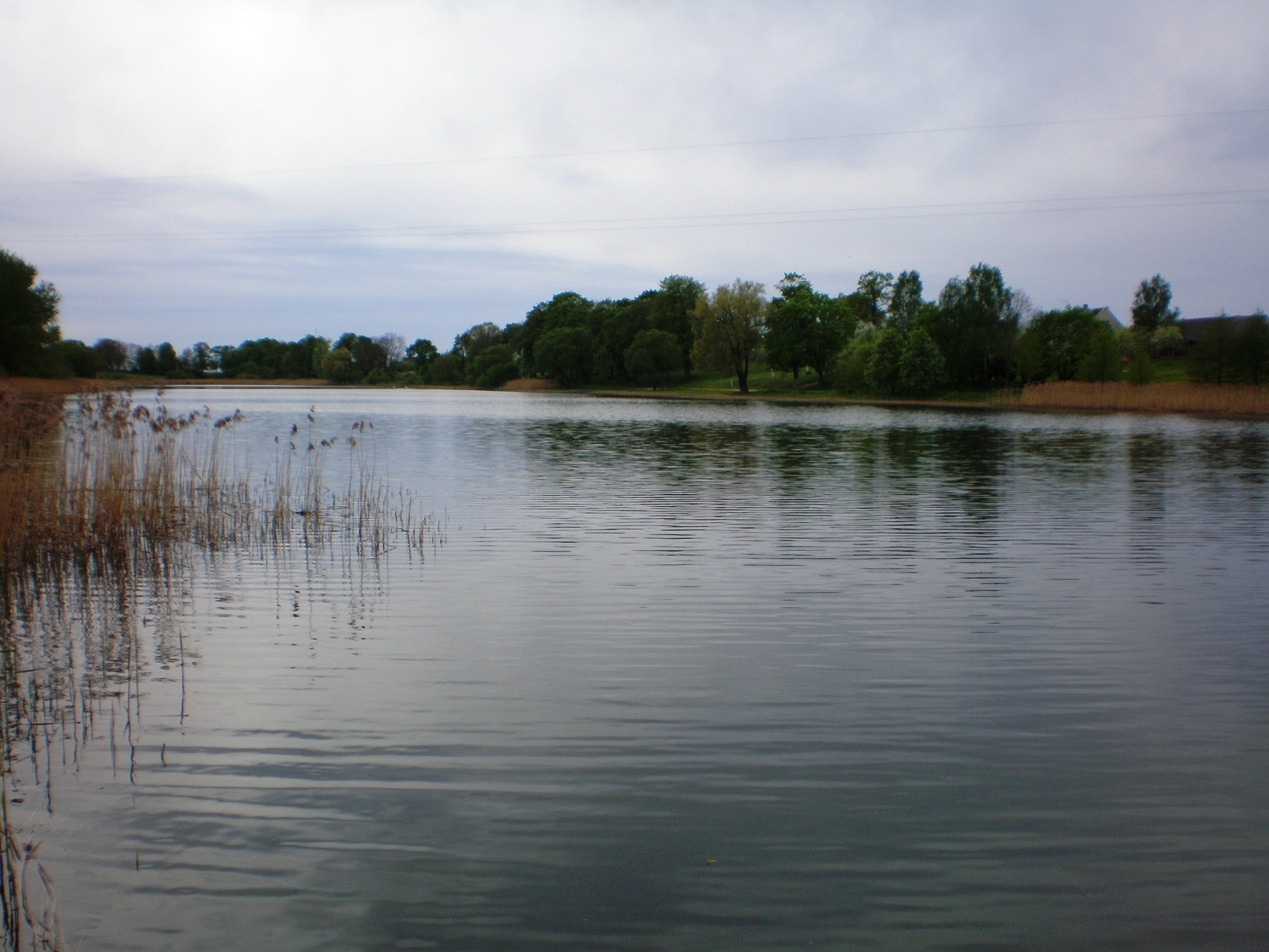 Rukų ežeras, Kėdainių raj.